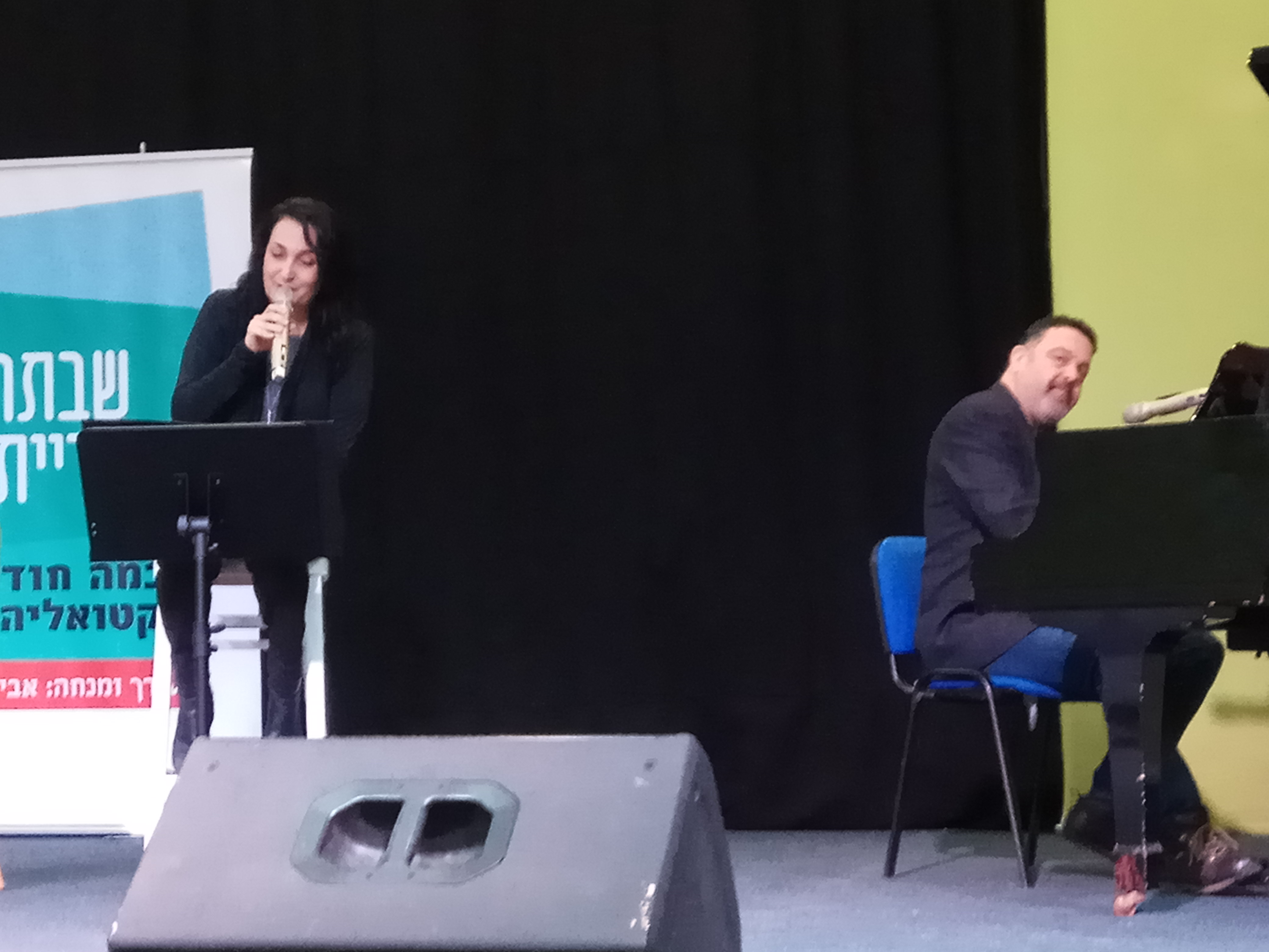 חני דינור בהופעה בקריית אונו עם רמי הראל